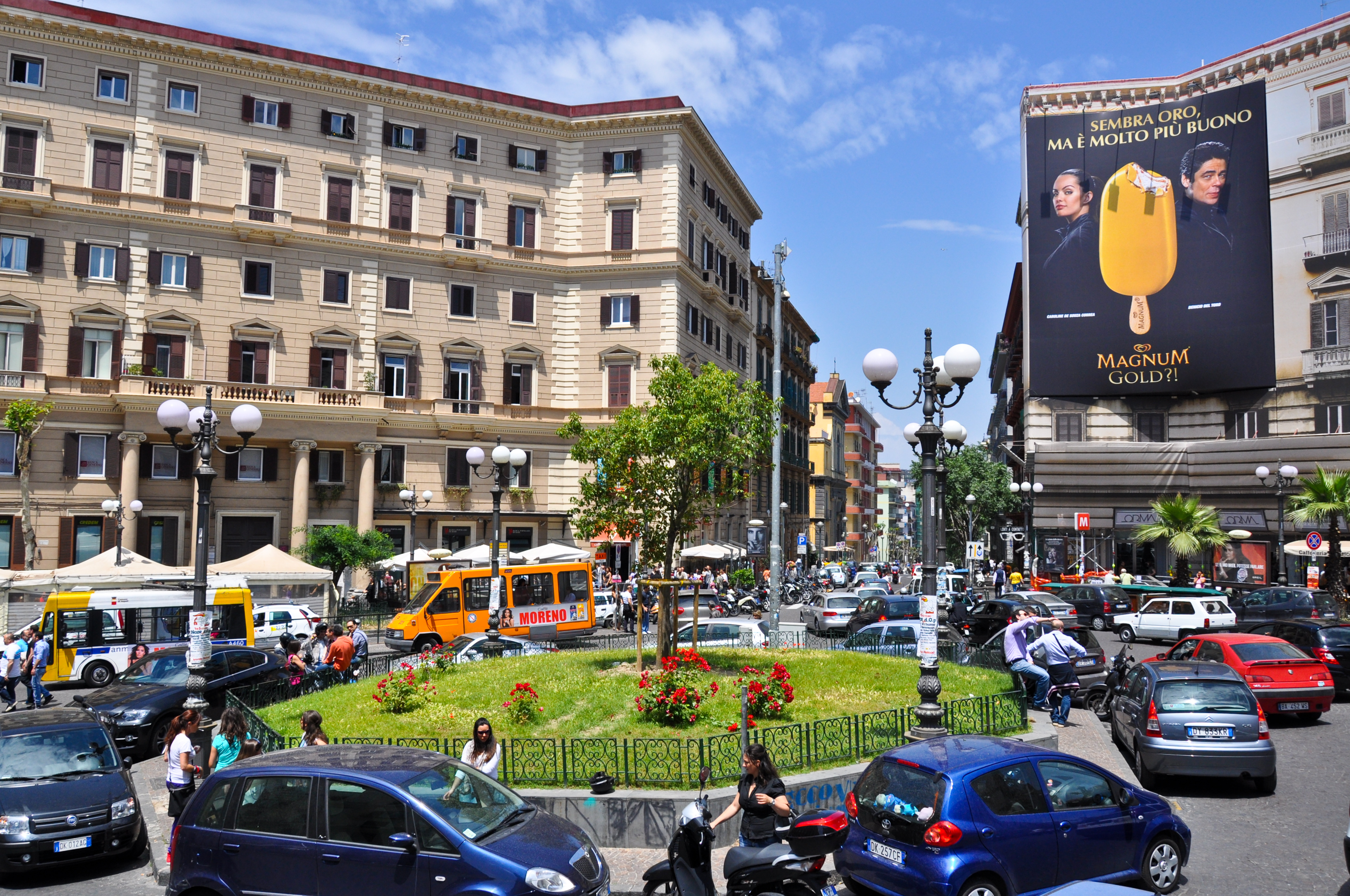 Piazza Vanvitelli (Napoli)